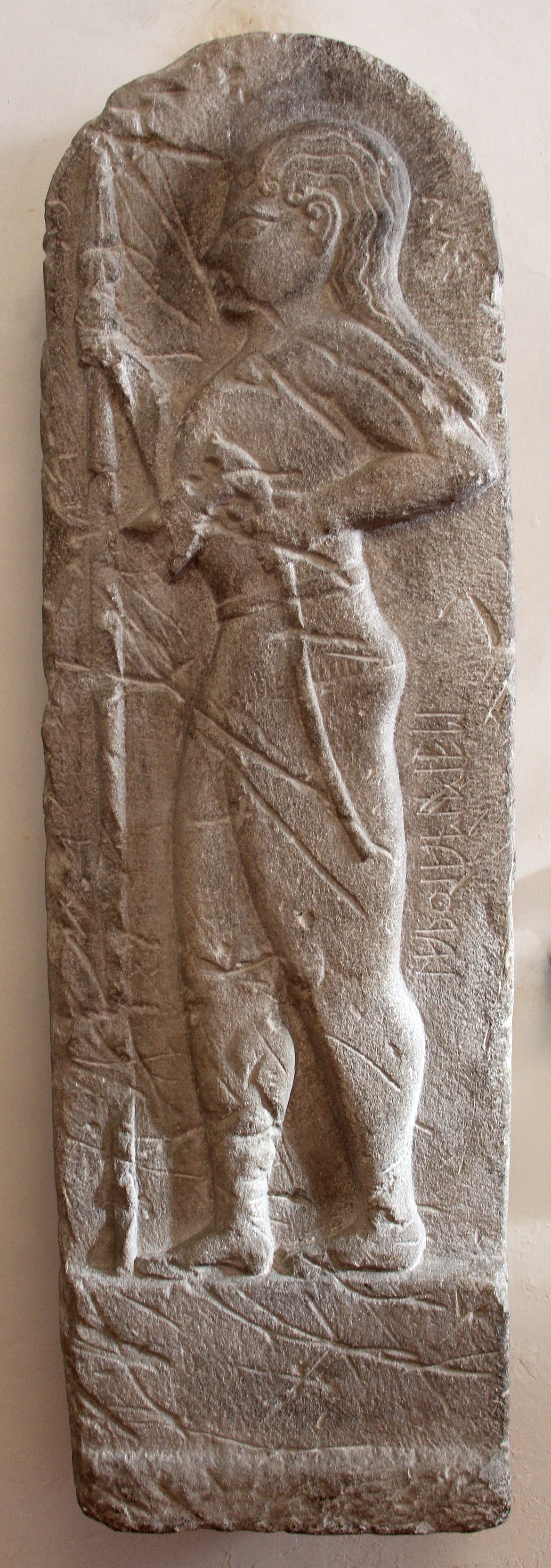 Stele di Larth Ninie. Casa Buonarroti, Firenze.